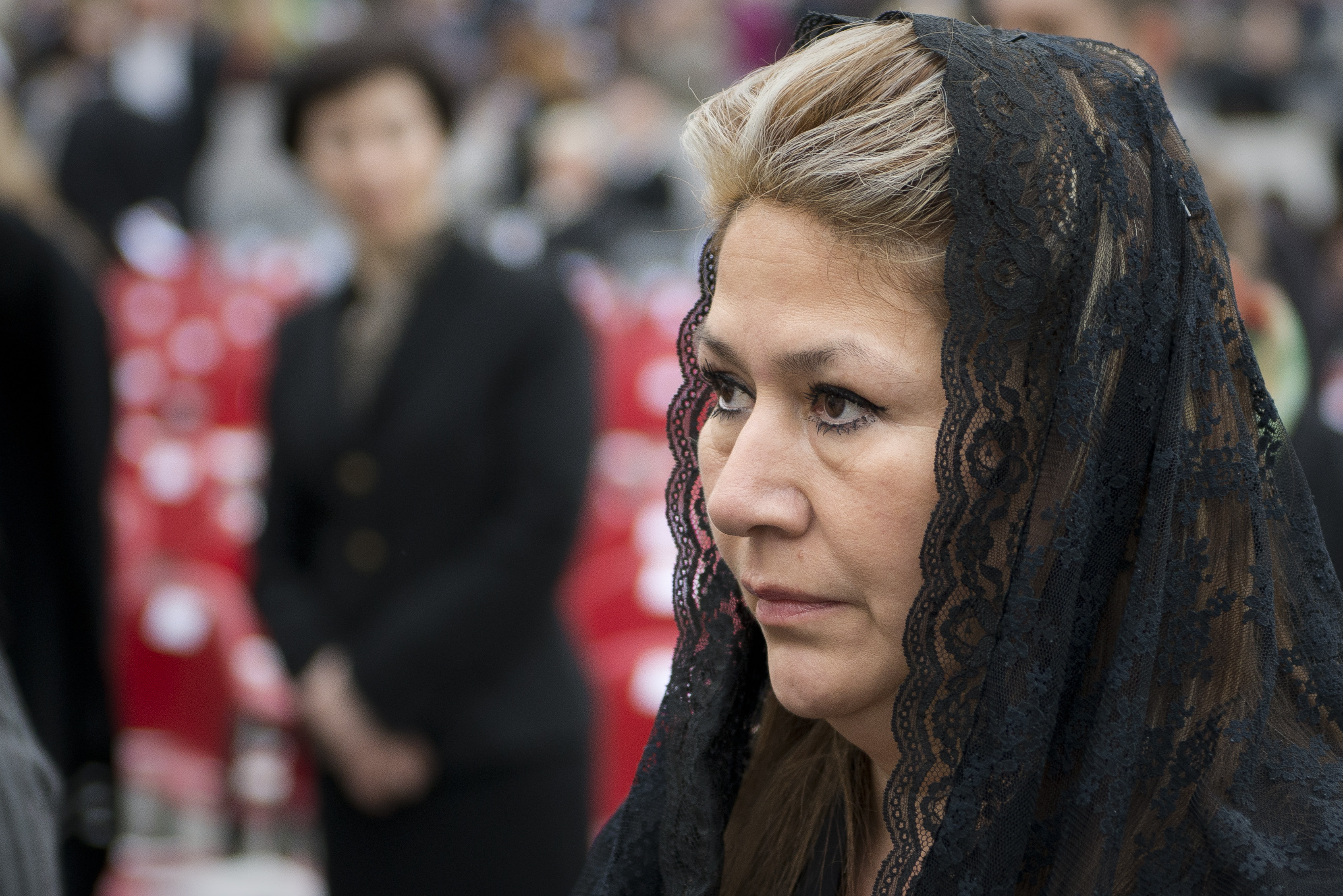 Floribeth Mora Diaz lors de la canonisation des papes Jean XXIII et Jean-Paul II.